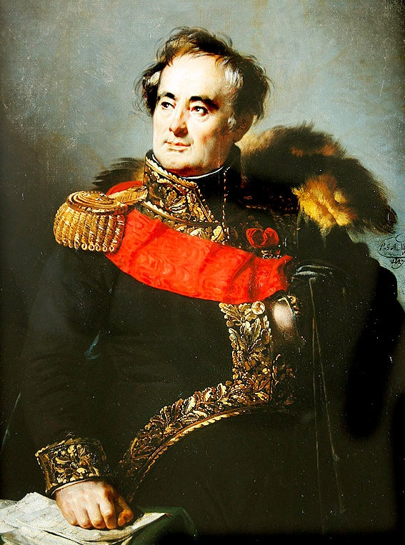 Charles Mathieu Isidore Decaen (1769-1832), général de division et comte de l'Empire.